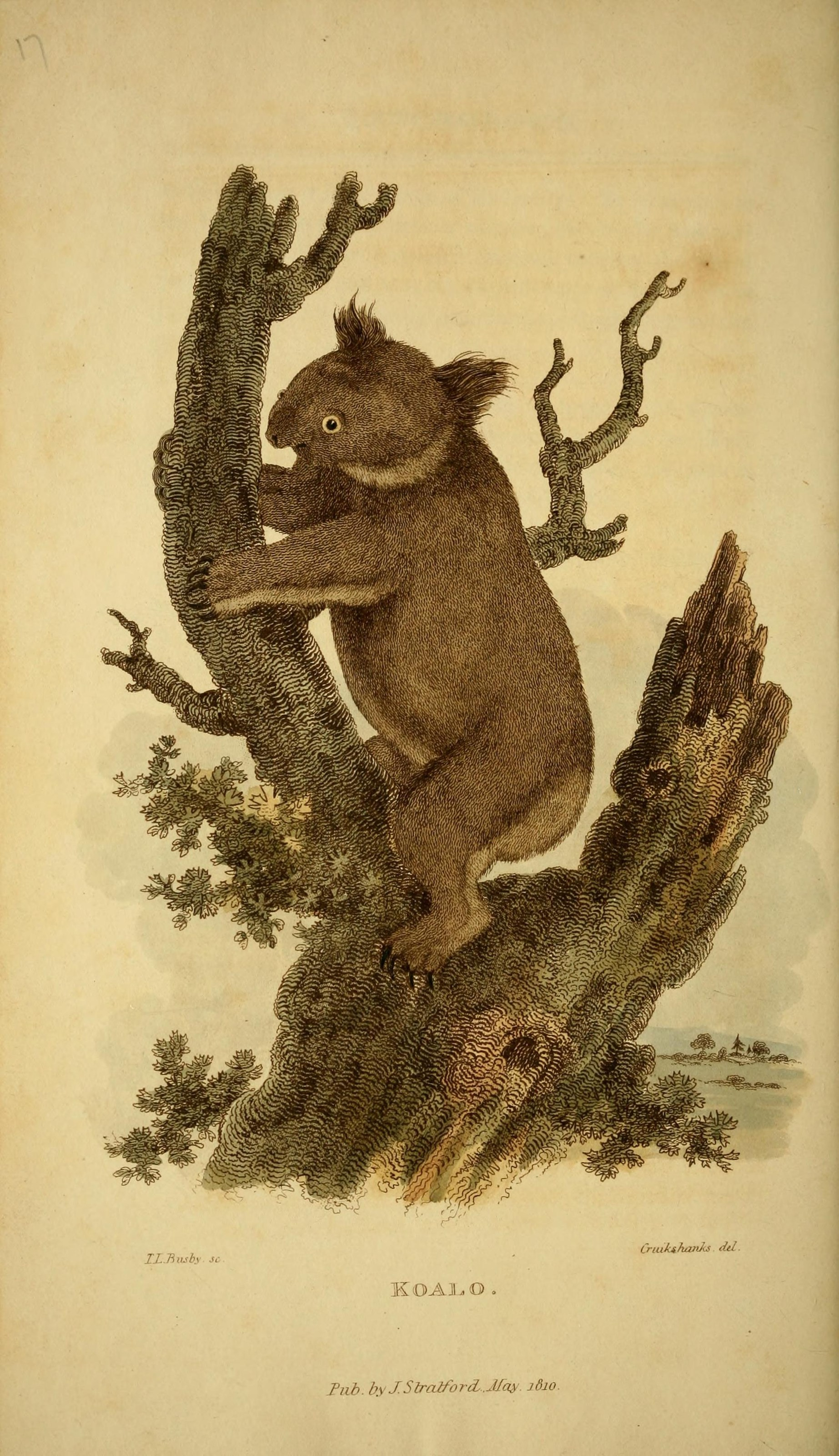 t'riut .f luinAS dtl Tab. by.rSlrat/ord.JJcu. j6io.